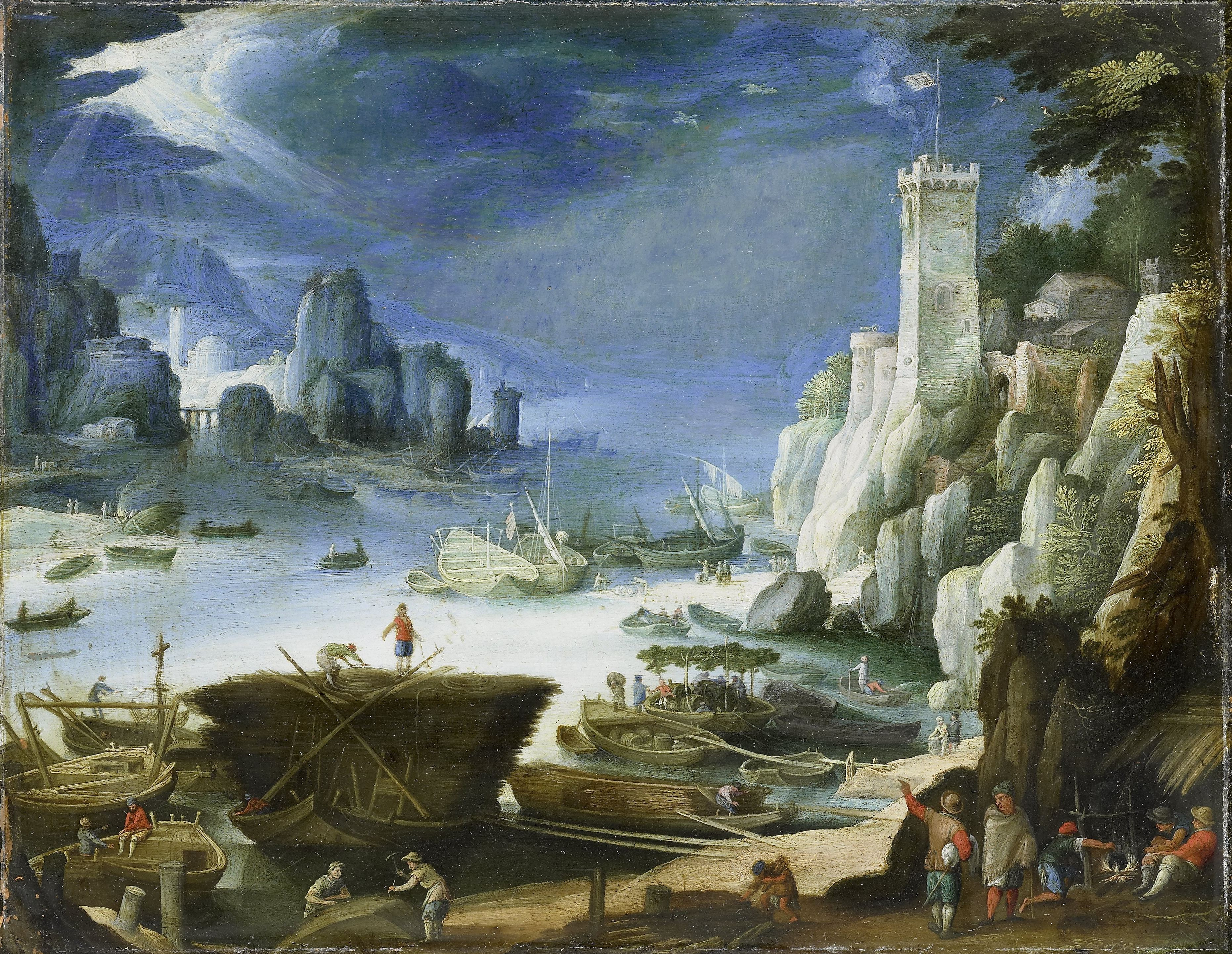 Riviergezicht met rotsen. Kustlandschap met de monding van een rivier. Aan de oevers liggen vele schepen, sommige worden gerepareerd. Rechts op de voorgrond zitten figuren rond een ketel op een vuur. In de verte een vestingtoren.